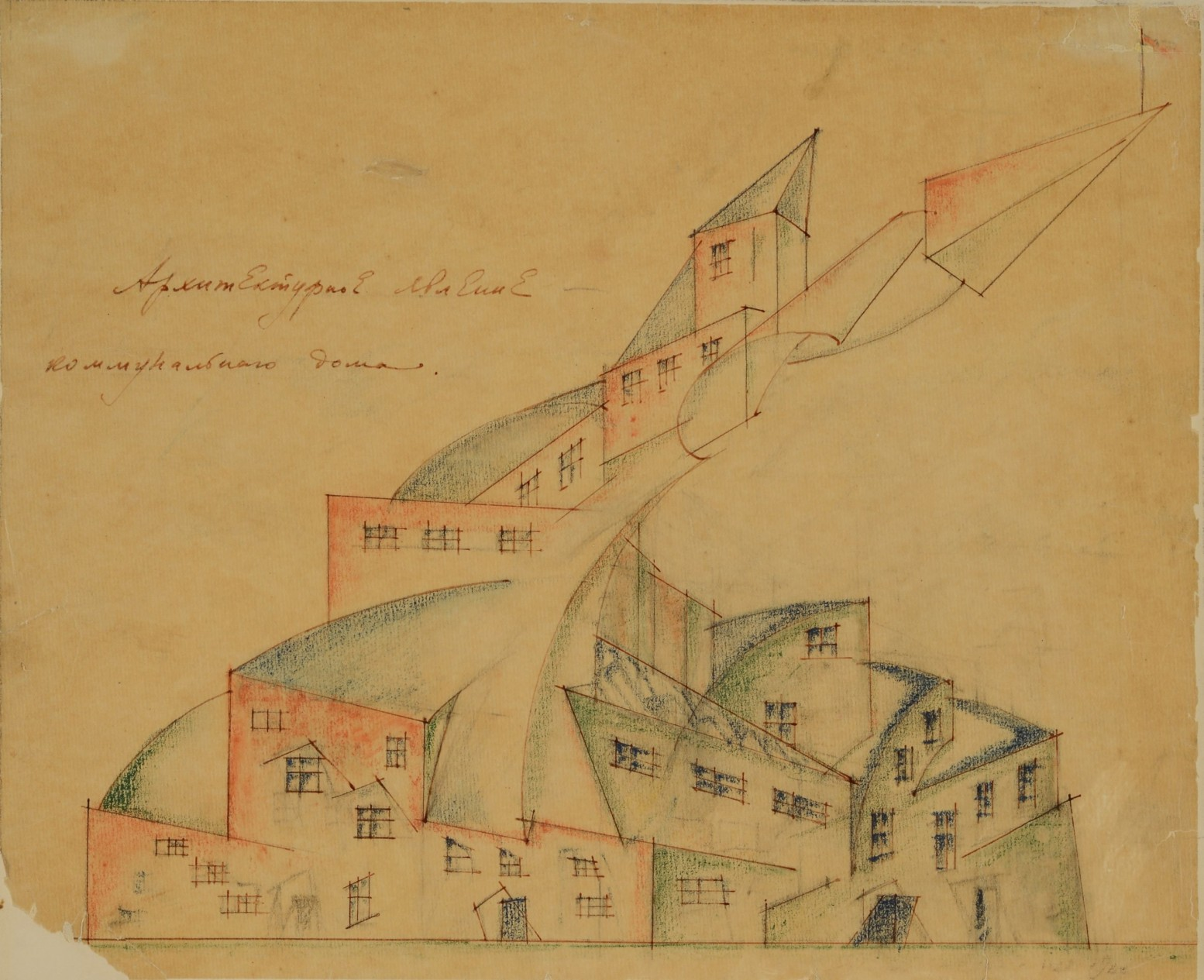 Architektonische Erscheinung eines Gemeinschaftshauses